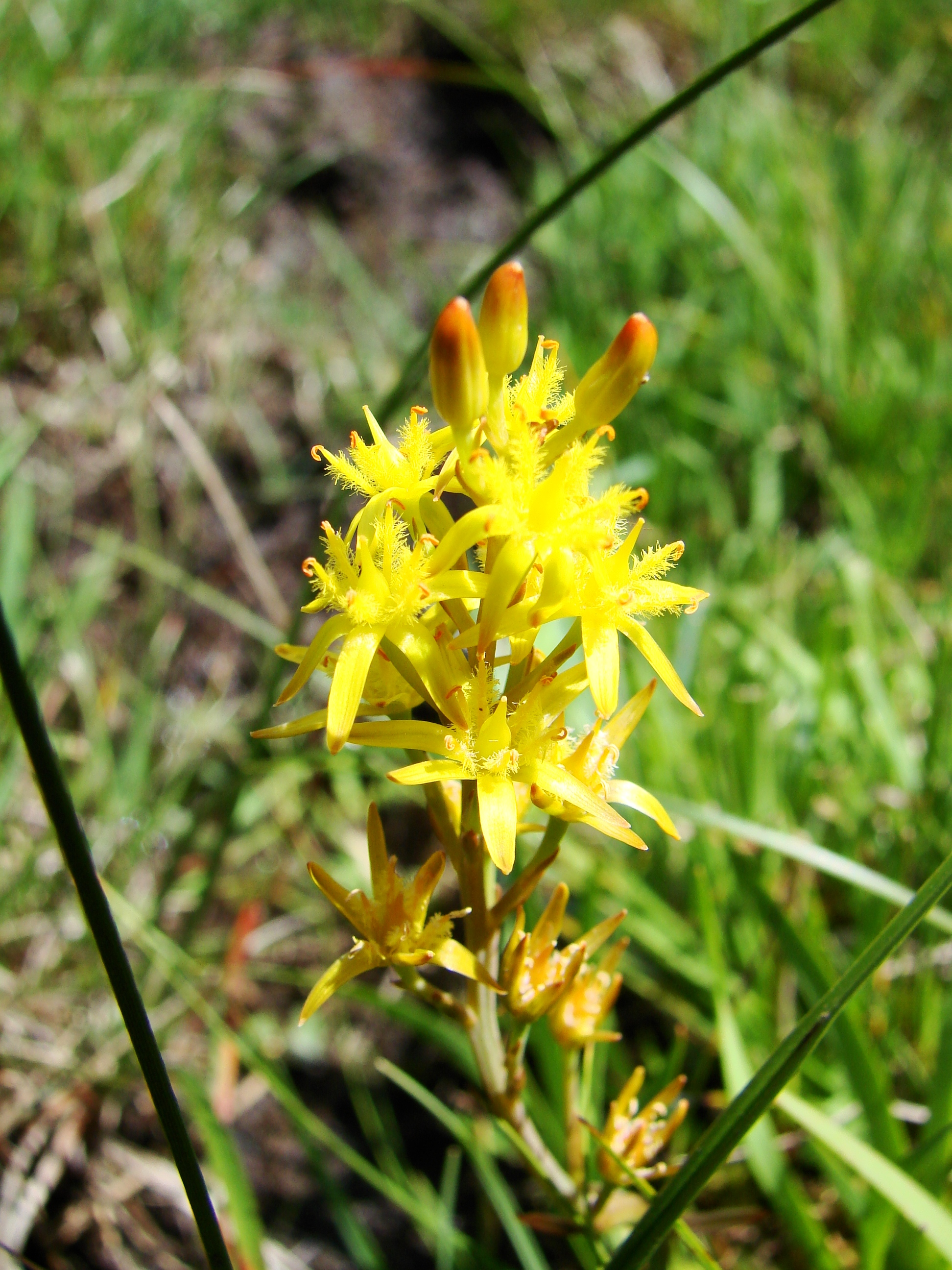 Vallée du Marcadau, Pyrénées françaises, commune de Cauterets, département des Hautes-Pyrénées (France) : Narthecium ossifragum